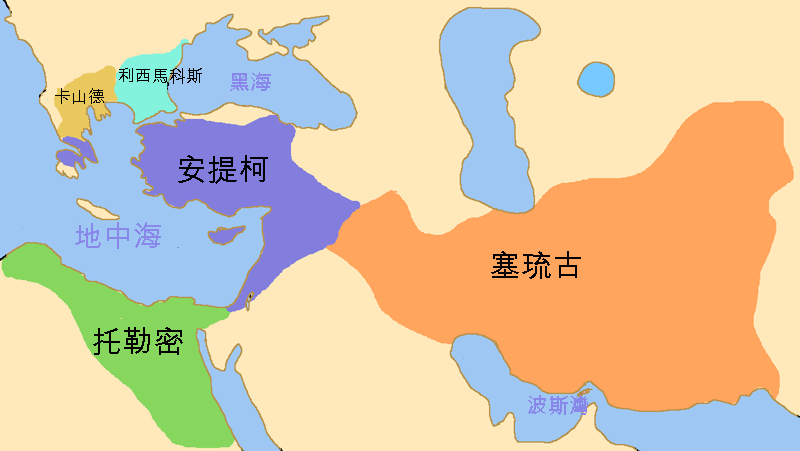 中文化